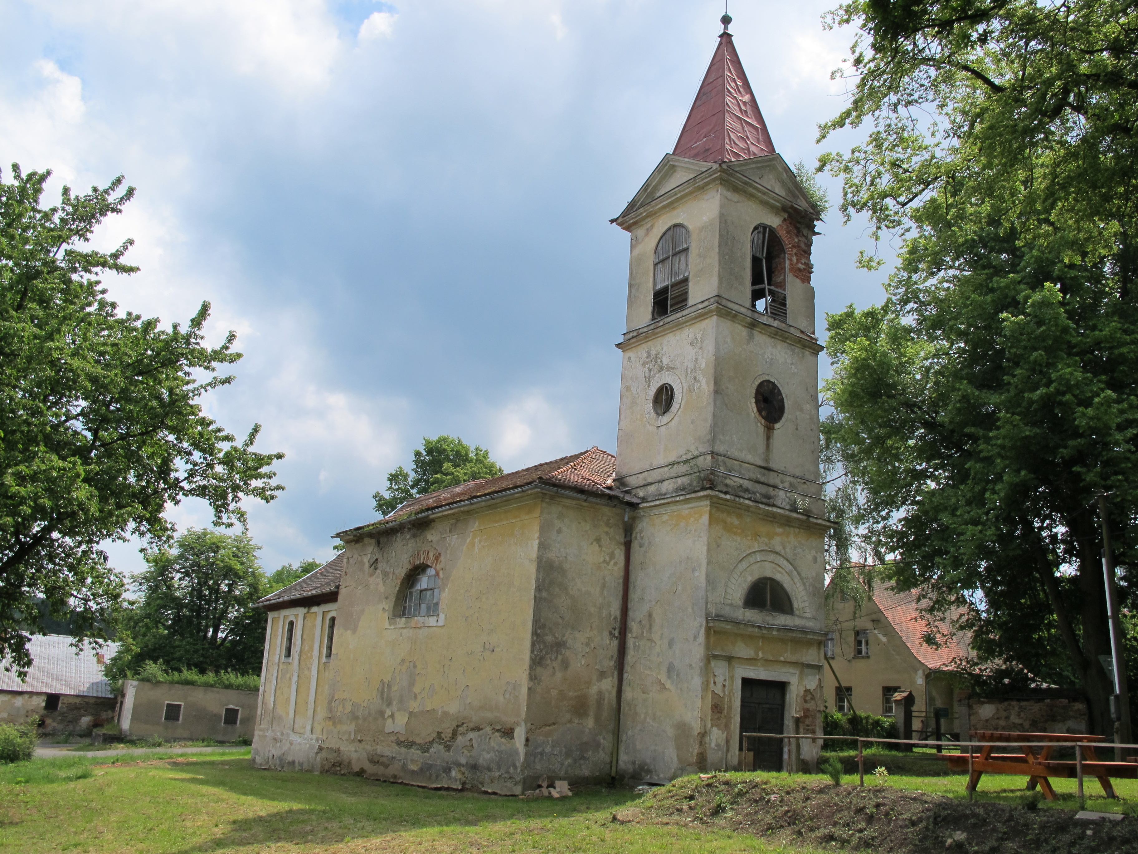 Kostel svaté Anny, Palič. This image was acquired during the event Wikiměsto Mariánské Lázně.